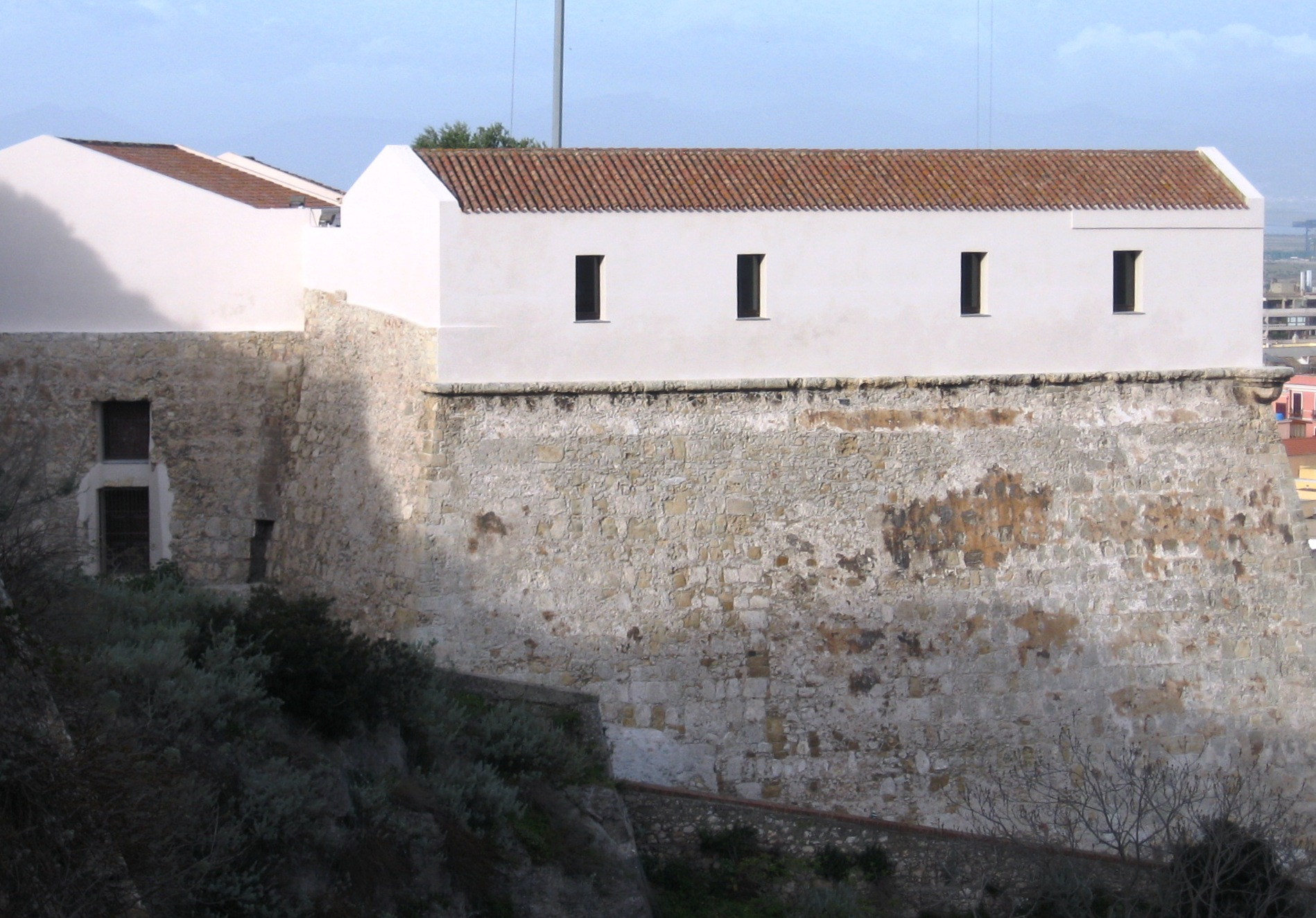 La caserma nell'ex ghetto ebraico a Cagliari.